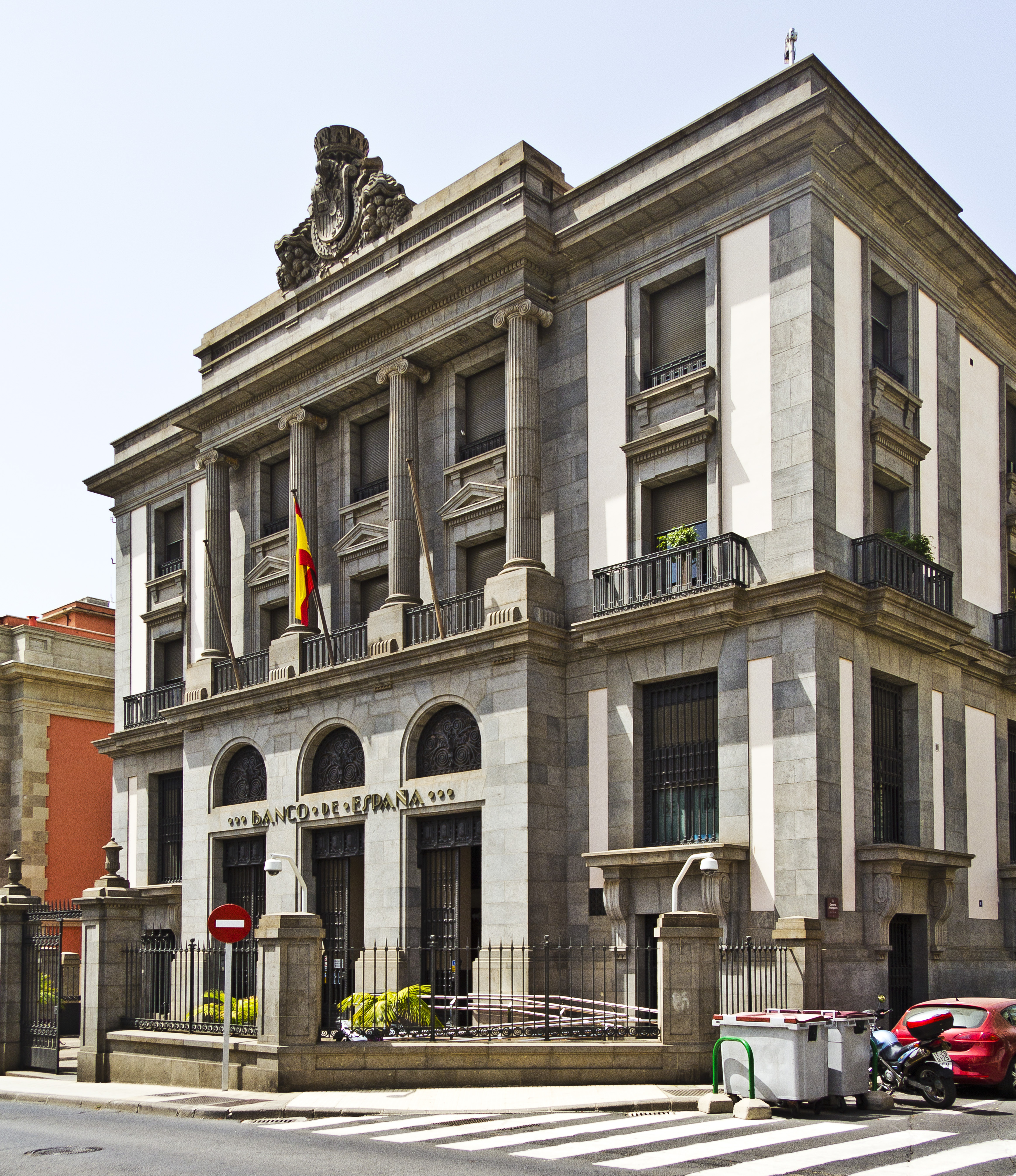 Das Gebäude der Banco de España in Santa Cruz de Tenerife wurde 1926 von den Architekten José Yarnoz Larrosa und Luis Menéndez Pidal entworfen. Das Gebäude steht im denkmalgeschützten Stadtteil Barrio de los Hoteles in Santa Cruz de Tenerife.